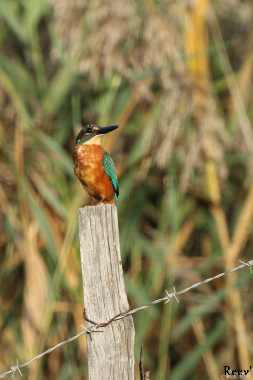 Martin pecheur d'Europe mâle pris en photo dans la Réserve Naturelle des Marais du Vigueirat en Octobre 2013.